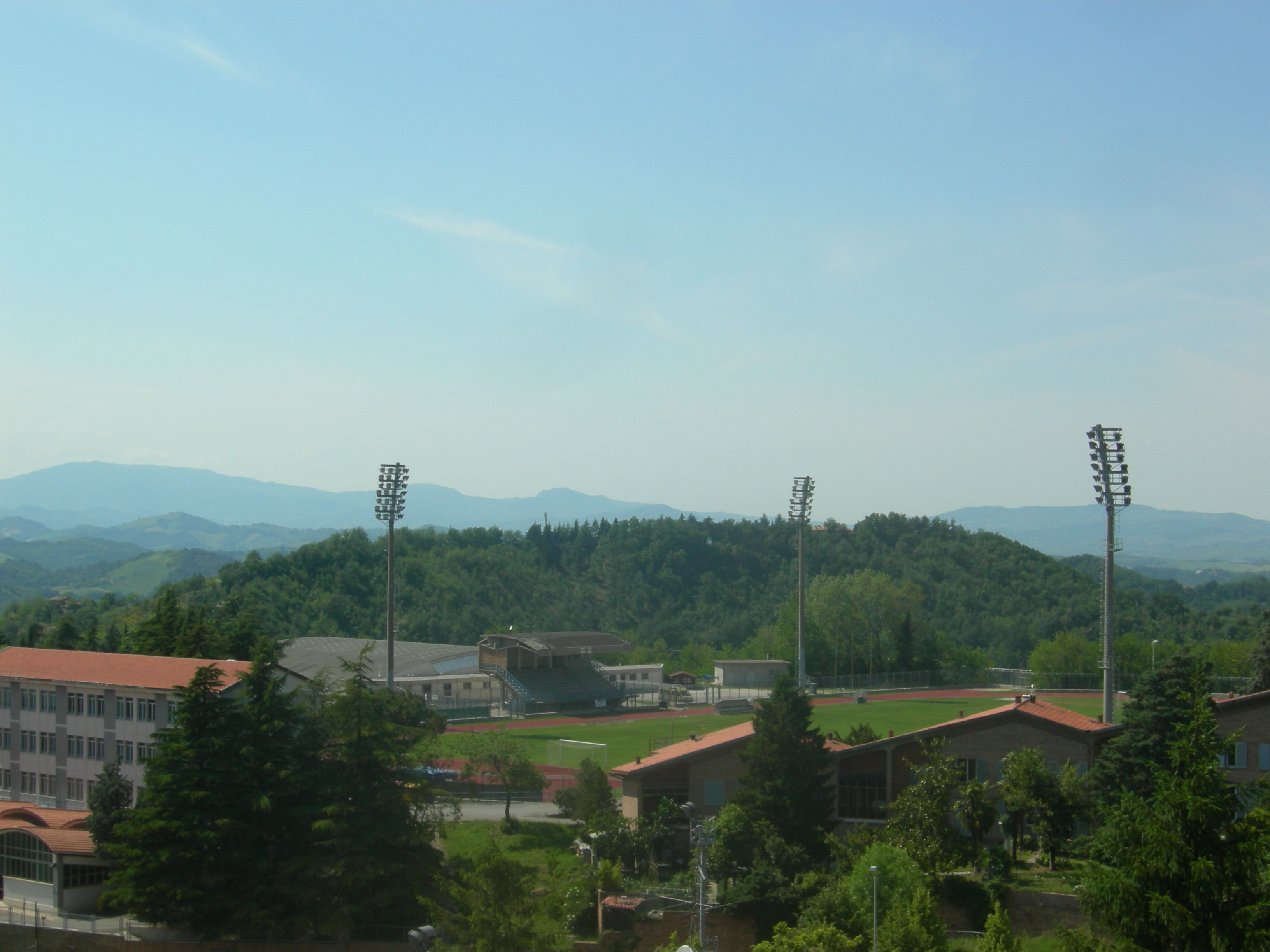 Lo Stadio Montefeltro di Urbino.